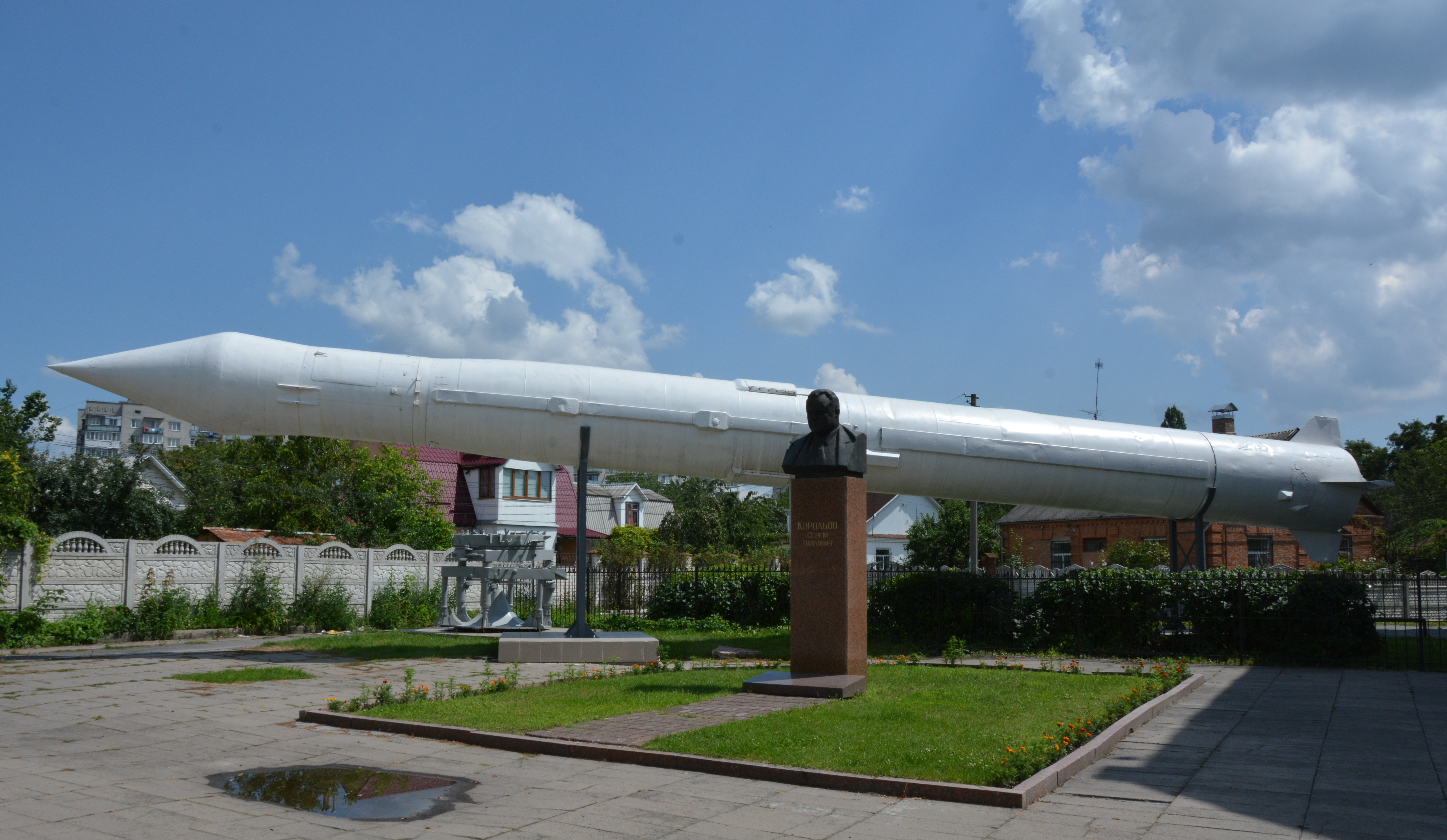 Пам'ятник С. П. Корольову — конструктору космічних ракет., Житомир, Вул. І. Франка, 2